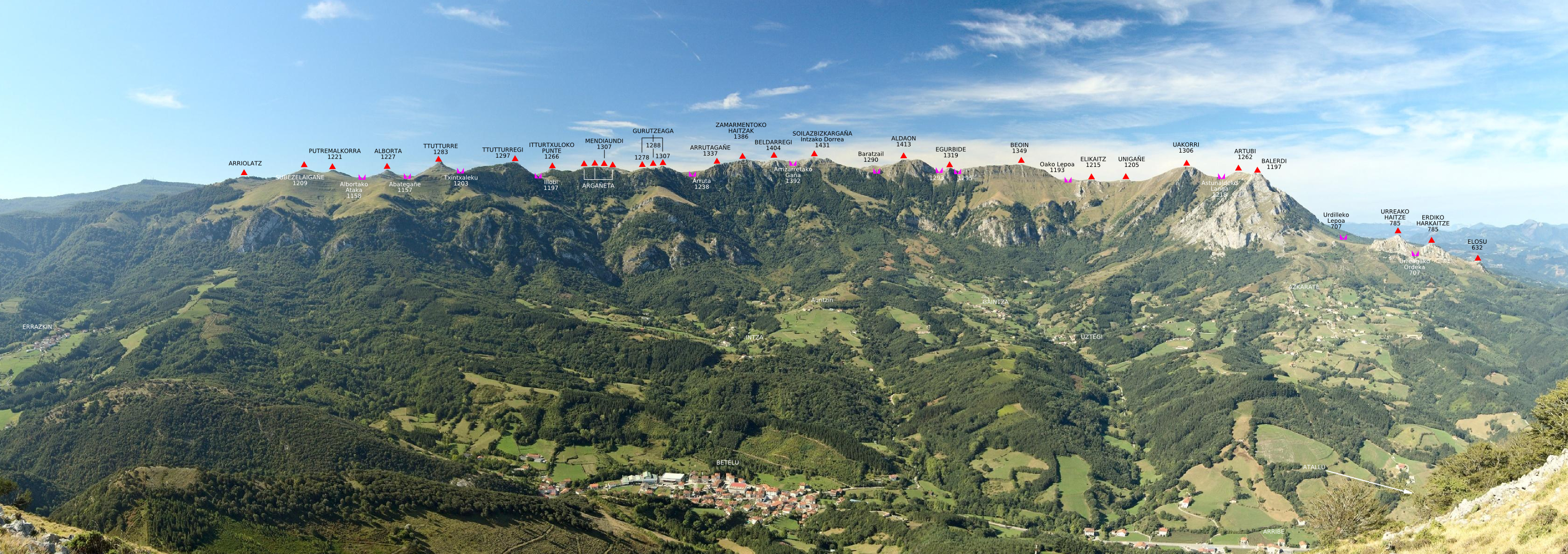 Malloetako mendi tontorrak Juan Mari Ansa-ren "Las Malloas de Aralar" liburutik hartutako datuak txertatuta.